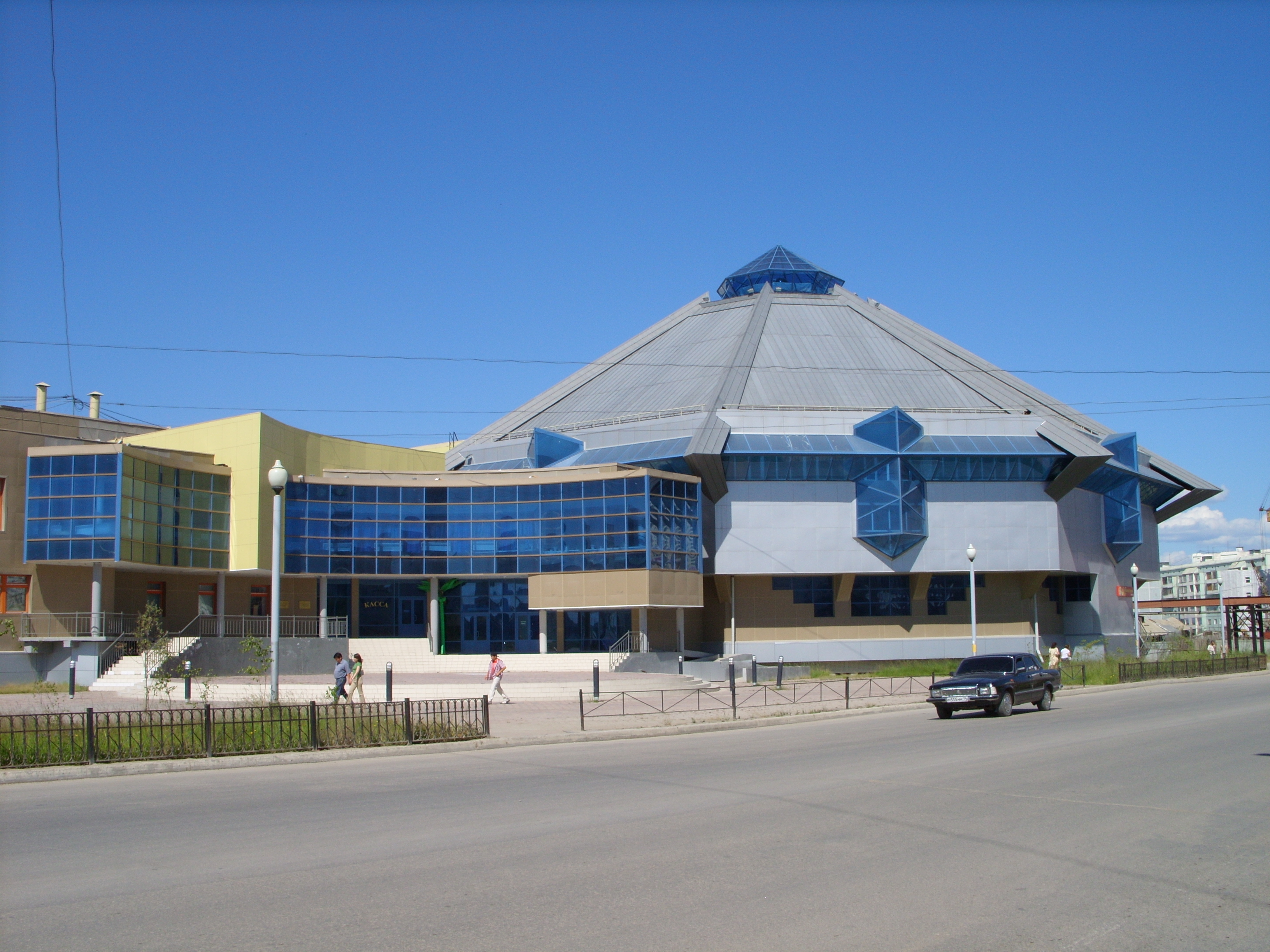 в г. Якутске, ул. Пояркова